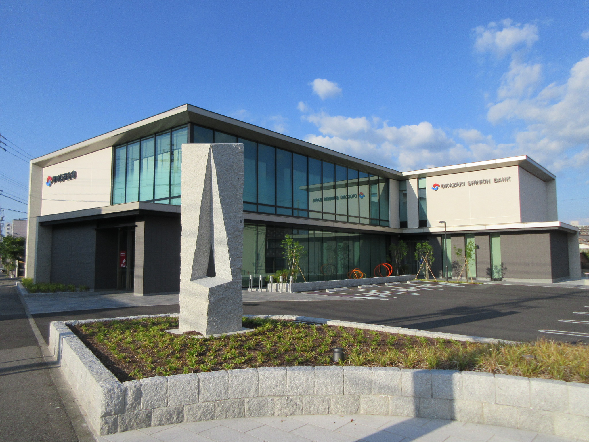 岡崎信用金庫 井田支店（岡崎市井田町）